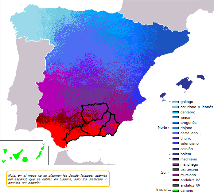 Andalucía Oriental en los acentos de España